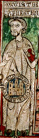 El primer maestre de la Orden de Santiago, Pedro Fernández de Castro (MAGISTER : P : FERRANDI[Z]) en una miniatura en la que Alfonso VIII de Castilla y Leonor de Plantagenet entregan el castillo de Uclés al Maestre de la Orden de Santiago Pedro Fernández de Fuentencalada (Magister P. Ferrandi[z]). Miniatura perteneciente al Tumbo menor de Castilla , que se encuentra en el Archivo Histórico Nacional de Madrid. Leyendas: ALIENOR : REGINA | ALFONSUS REX : | MAGISTER : P : FERRANDI[Z] | CASTELLUM DE : UCLES | QUIDAM FRATER